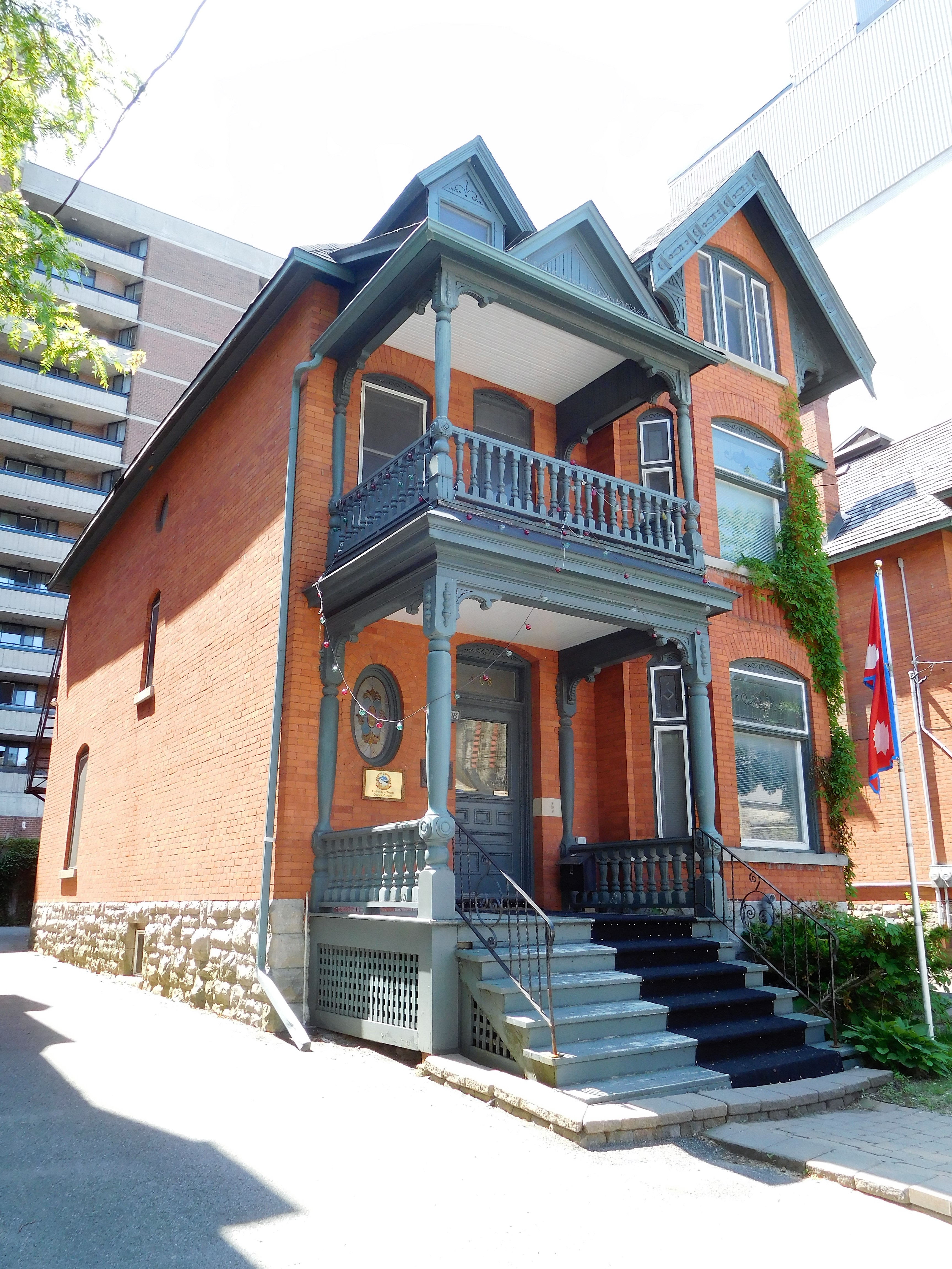 408 Queen Street, Ottawa Embassy of Nepal